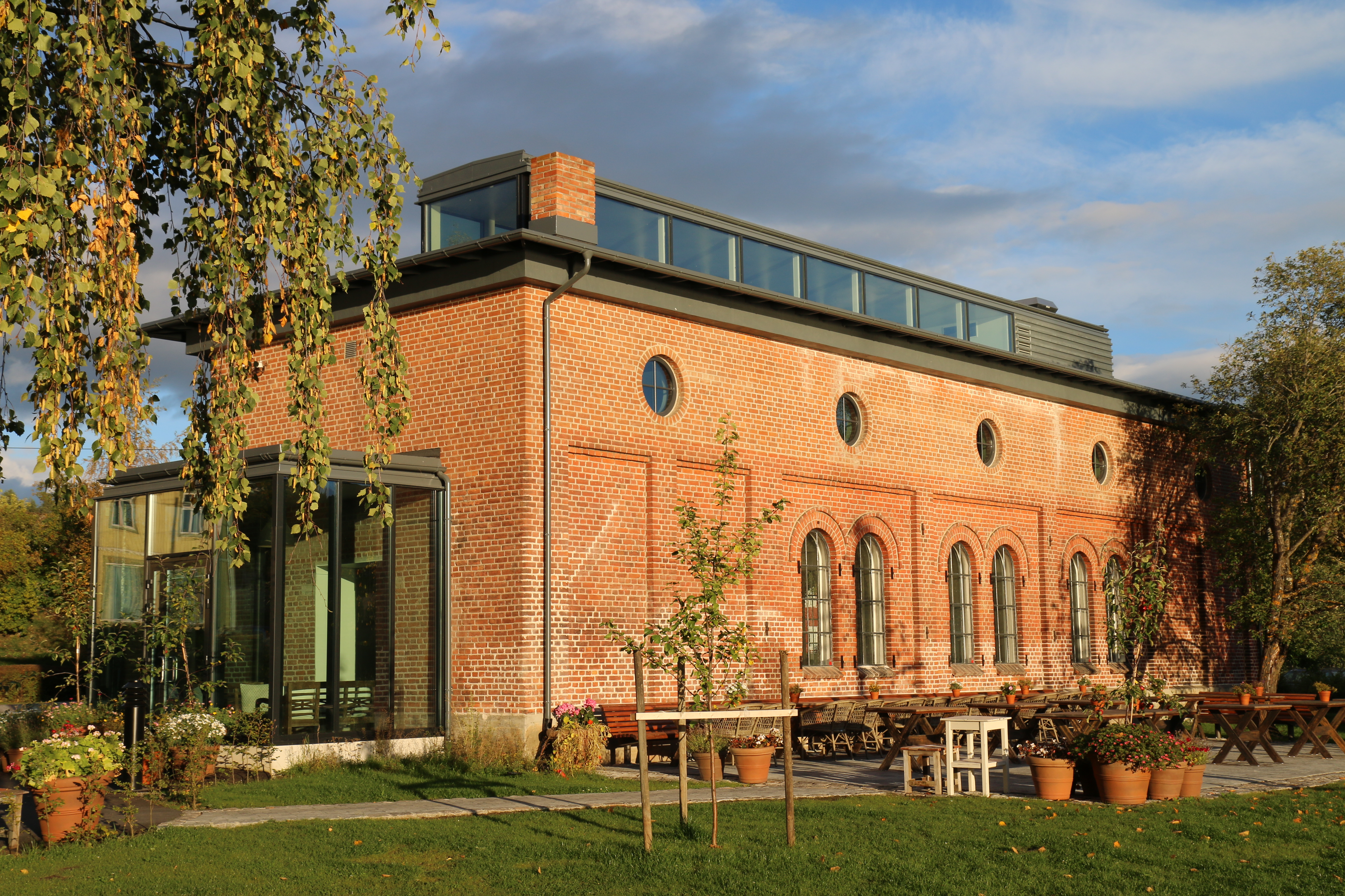 Lokomotivstallen i Røykenvika ved Randsfjorden på Hadeland.